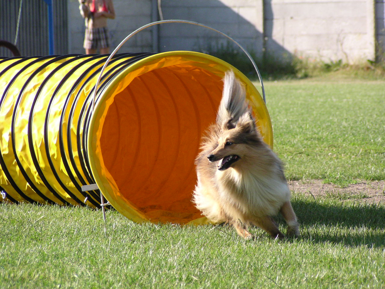 photo by Martina Vakoničová (